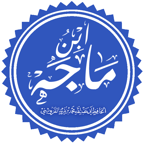 الحافظ أبي عبد الله محمد بن يزيد بن ماجة القزويني